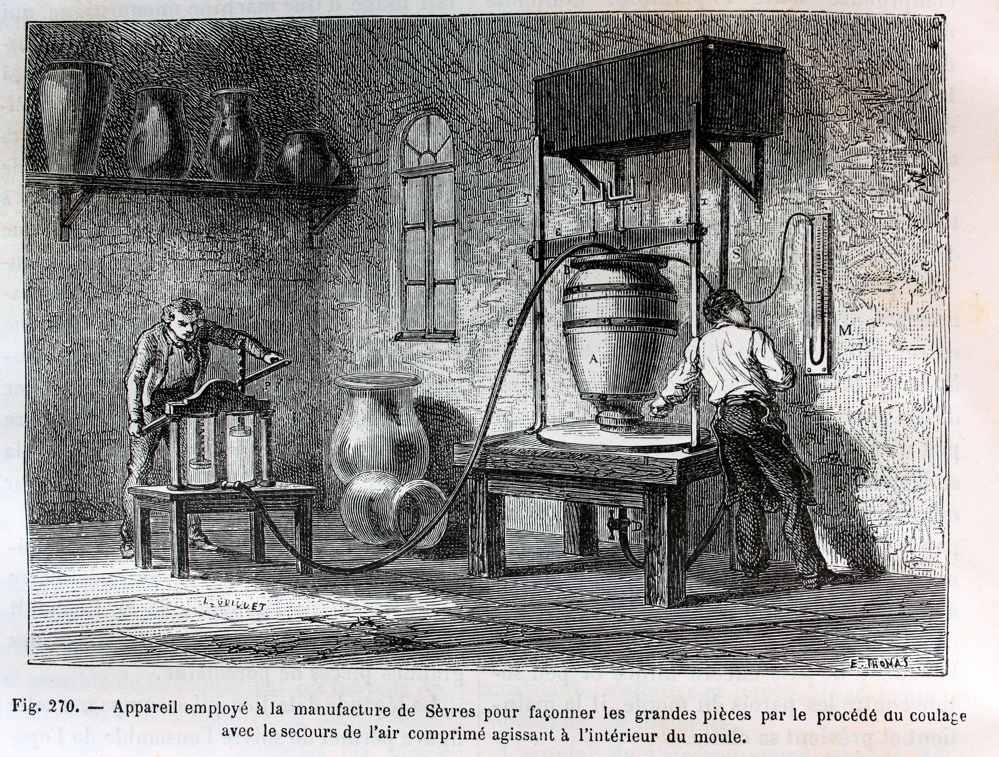 Ilustraciones de la obra : Les merveilles de l'industrie ou, Description des principales industries modernes / par Louis Figuier. - Paris : Furne, Jouvet, [1873-1877]. - Tome I